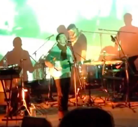 Anímic a #4Raons, el 2013.